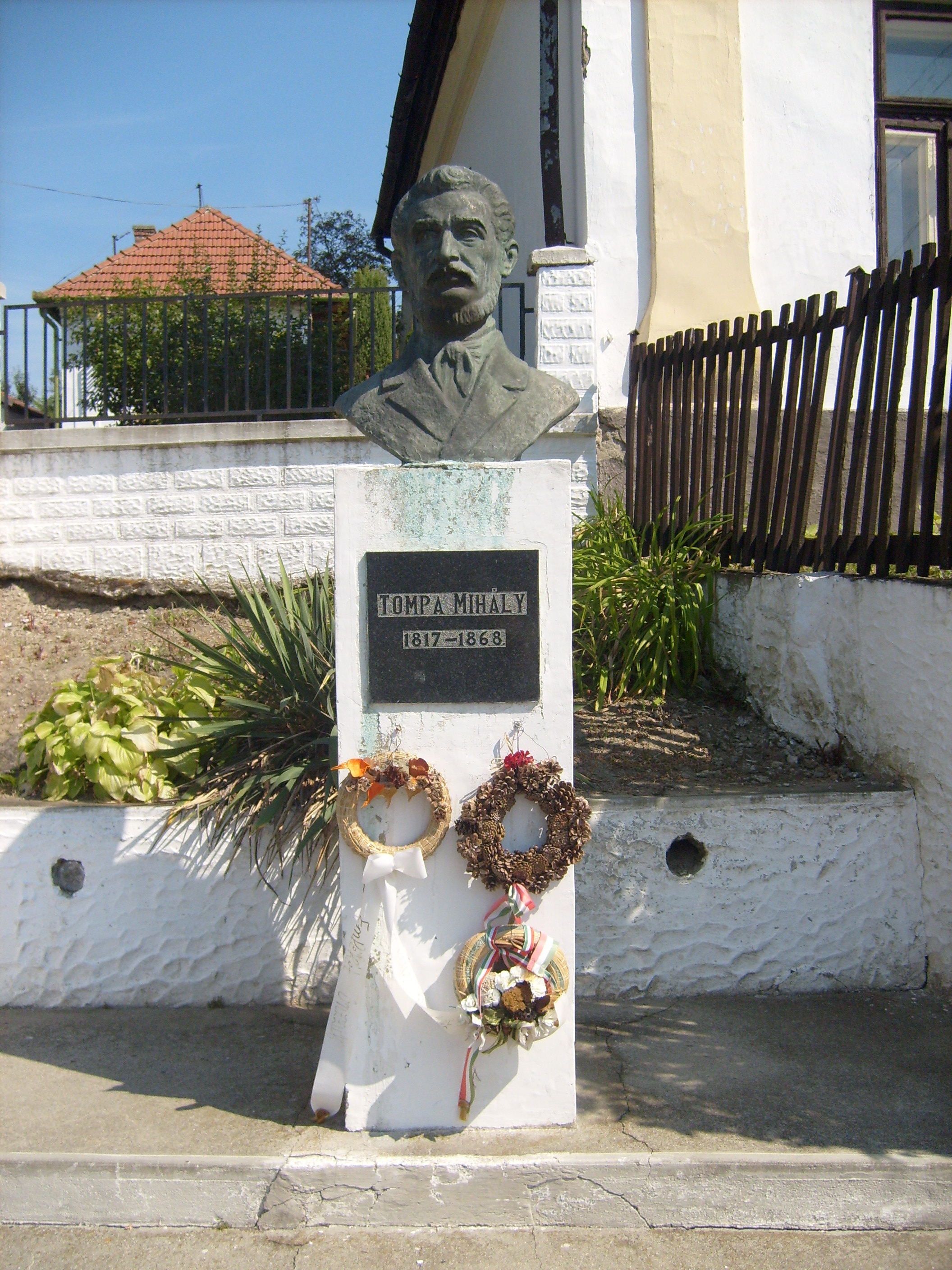 Tompa Mihály emlékműve Kelemérben